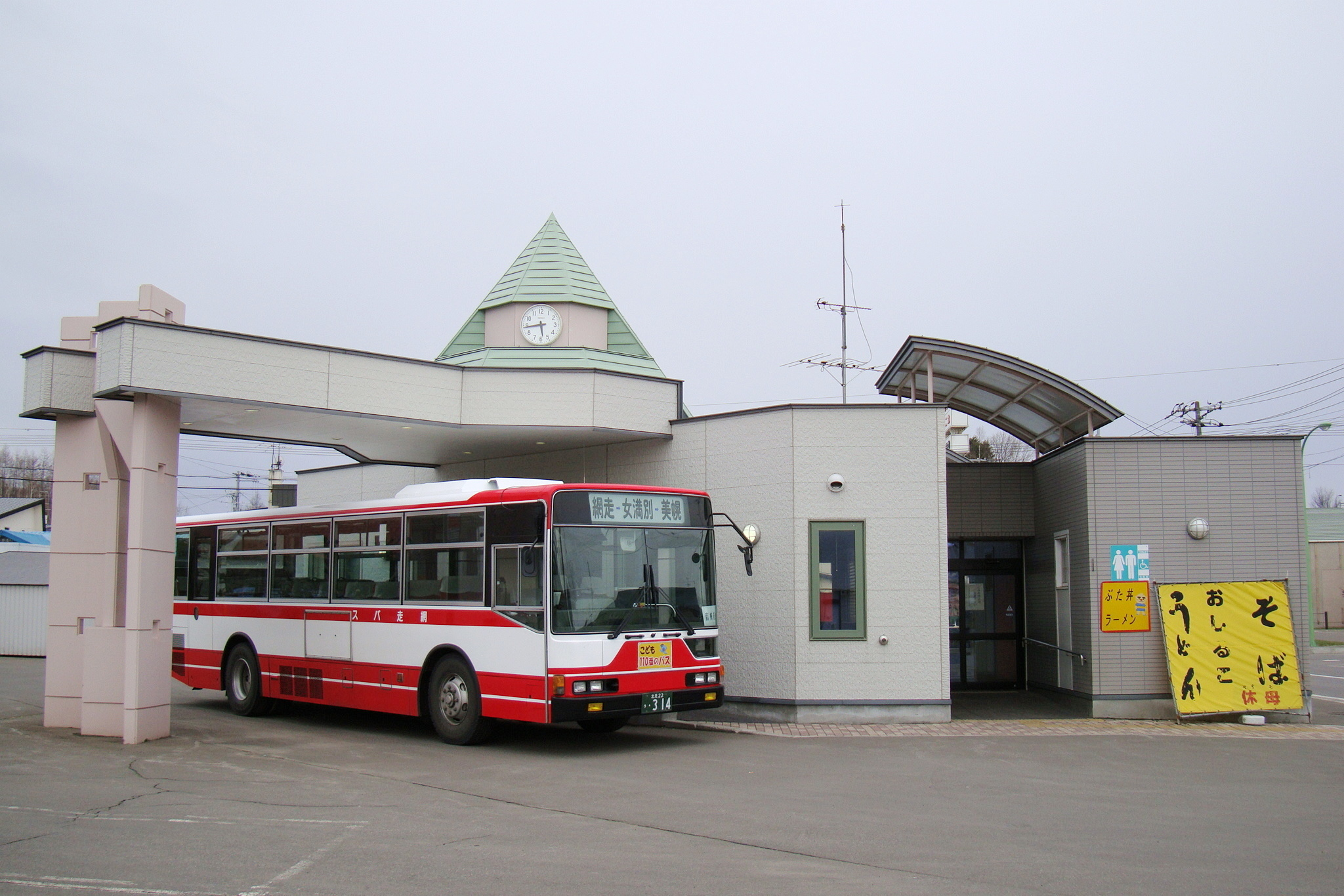 Koshimizu depot